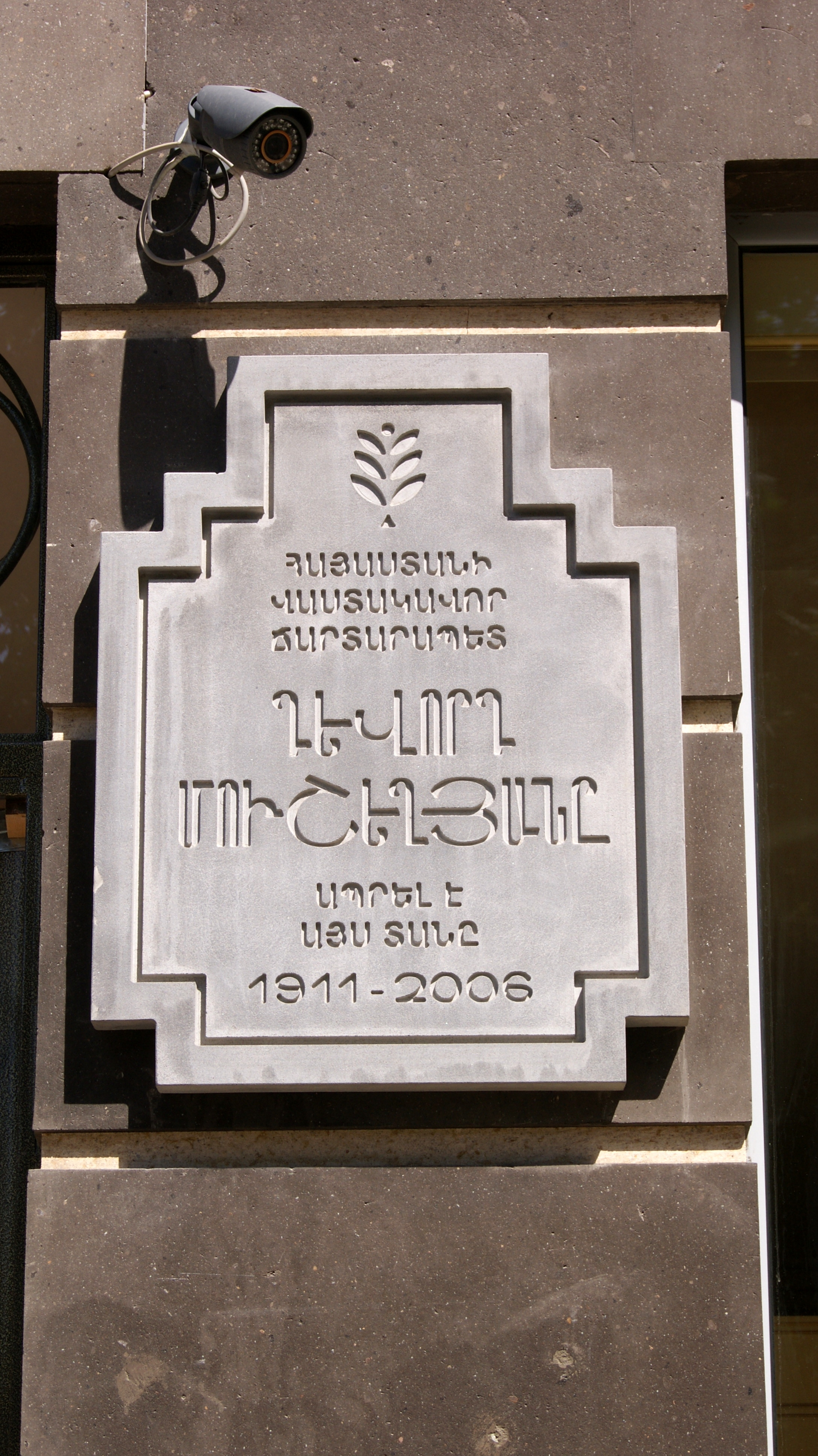 Բնակելի տուն Սարգիս Հախնազարյանի 6/206.11